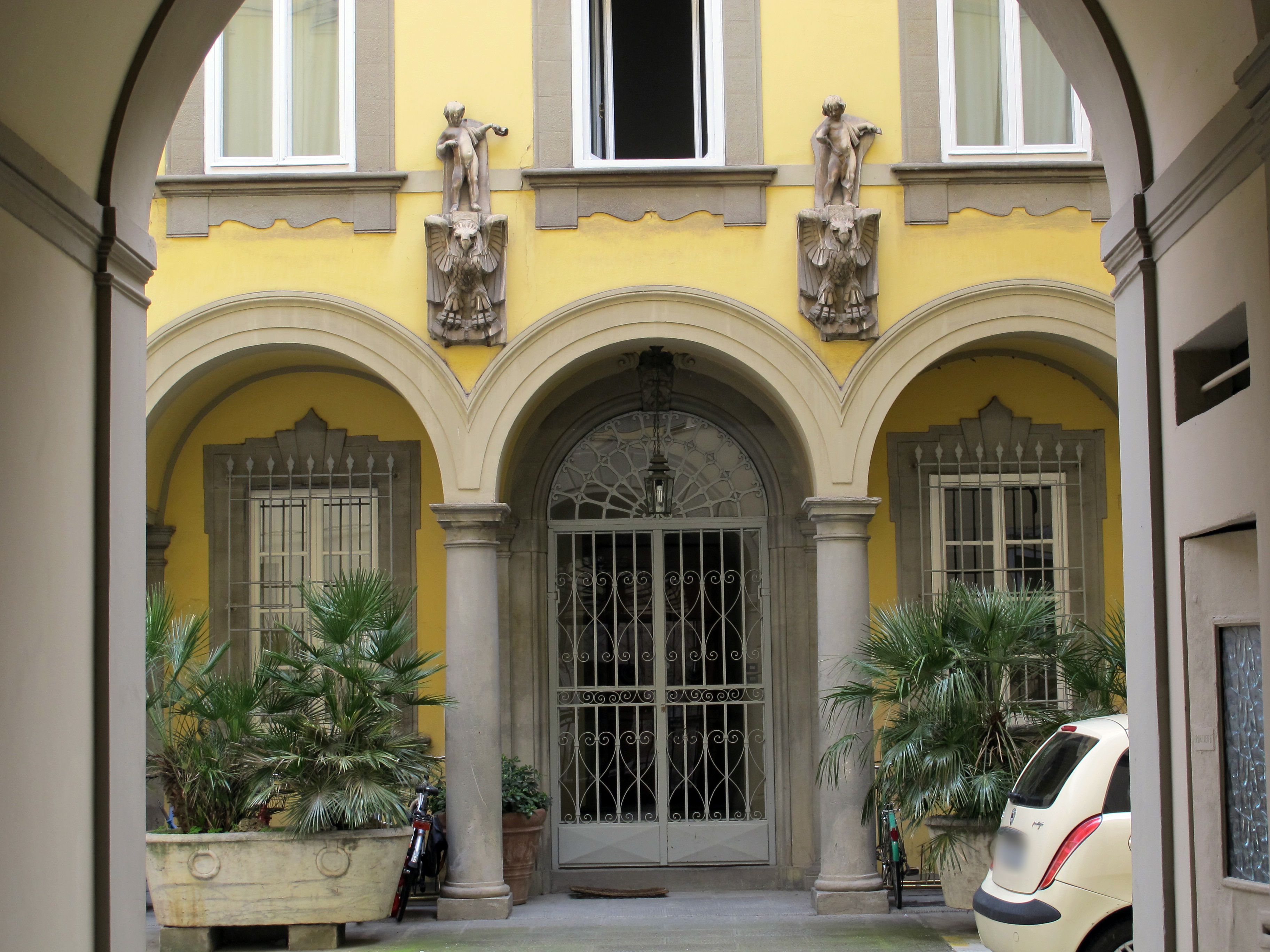 Borgo la croce 1, Palazzina Grottanelli, 06 ex- teatro alhambra